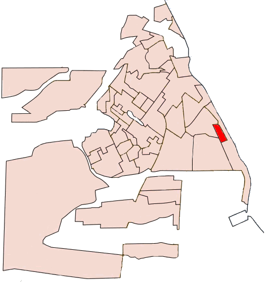 Barrio 2 de Abril